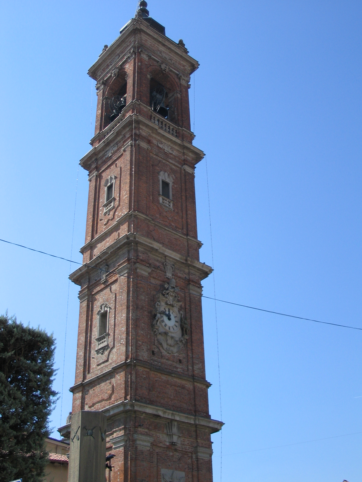 Autore Giorces. Levate, torre campanaria.